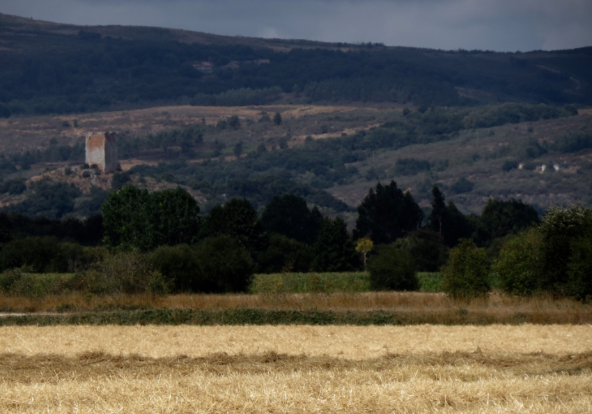 vista desde la Lagoa